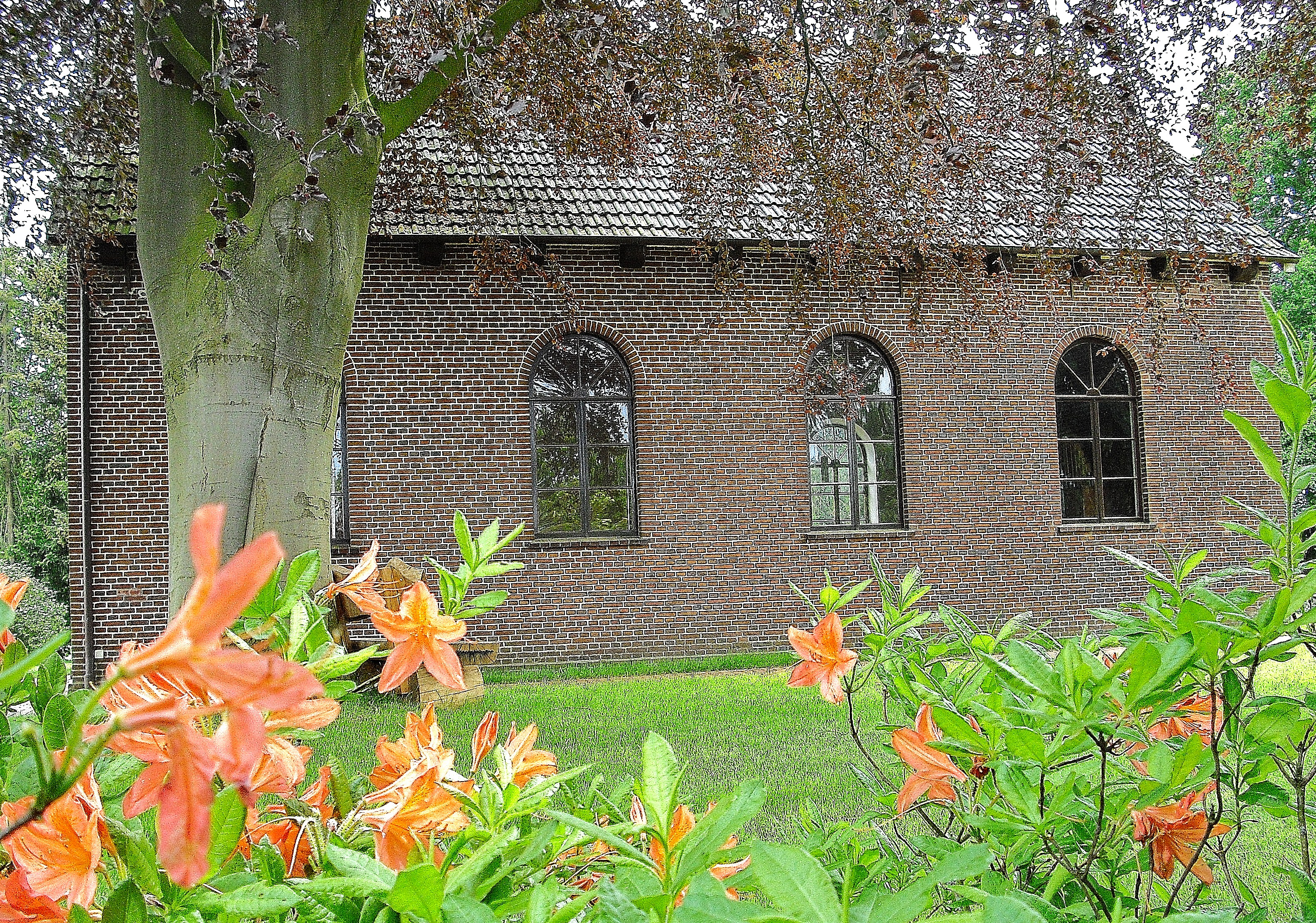 Bethaus der Baptisten in Felde - Seitenansicht